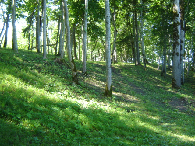 Linnuse vall